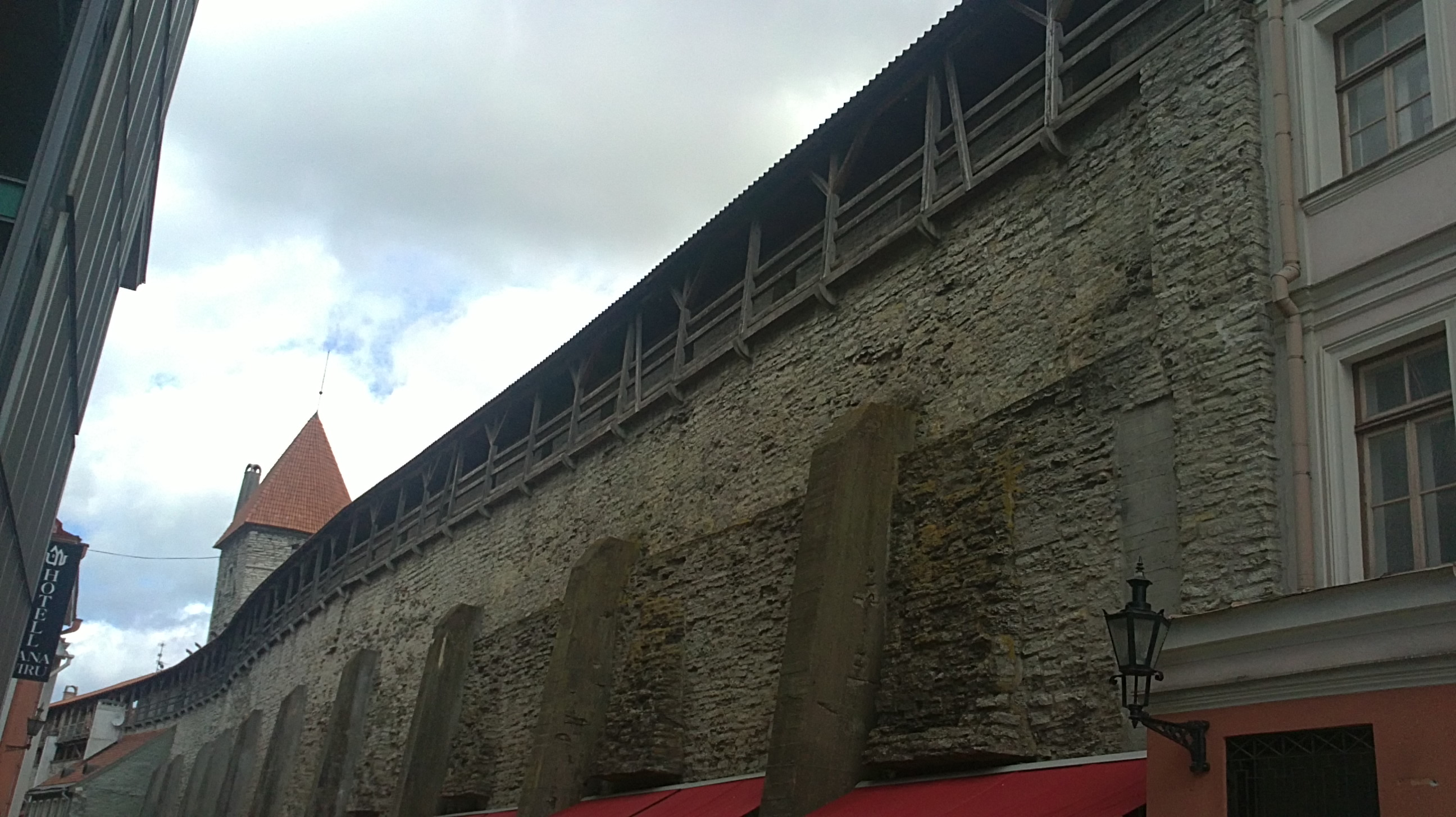 Tallinna linnamüüri osa, Müürivahe tänaval